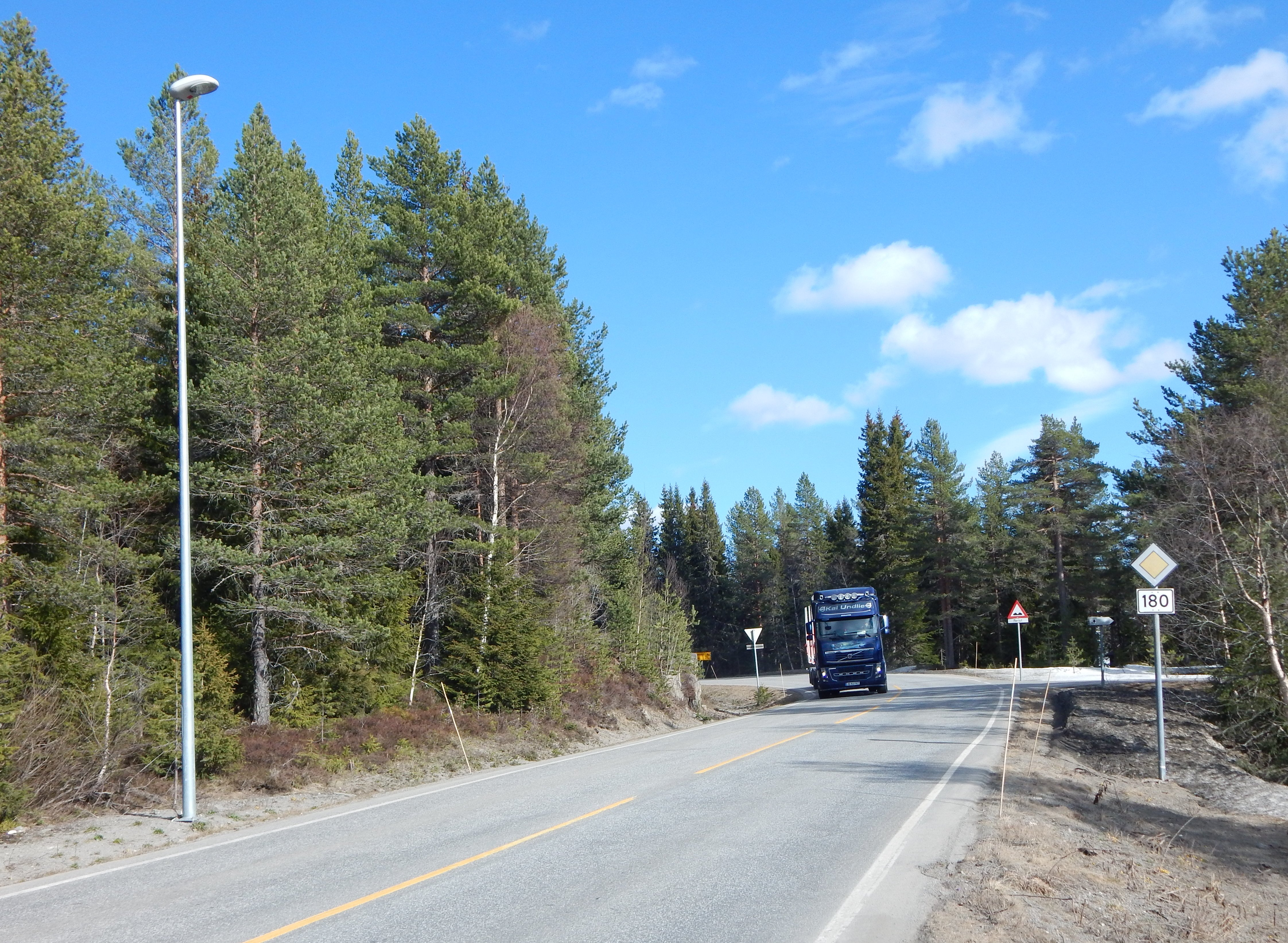 Primær fylkesvei 180 like øst for riksvei 4 ved Lygna